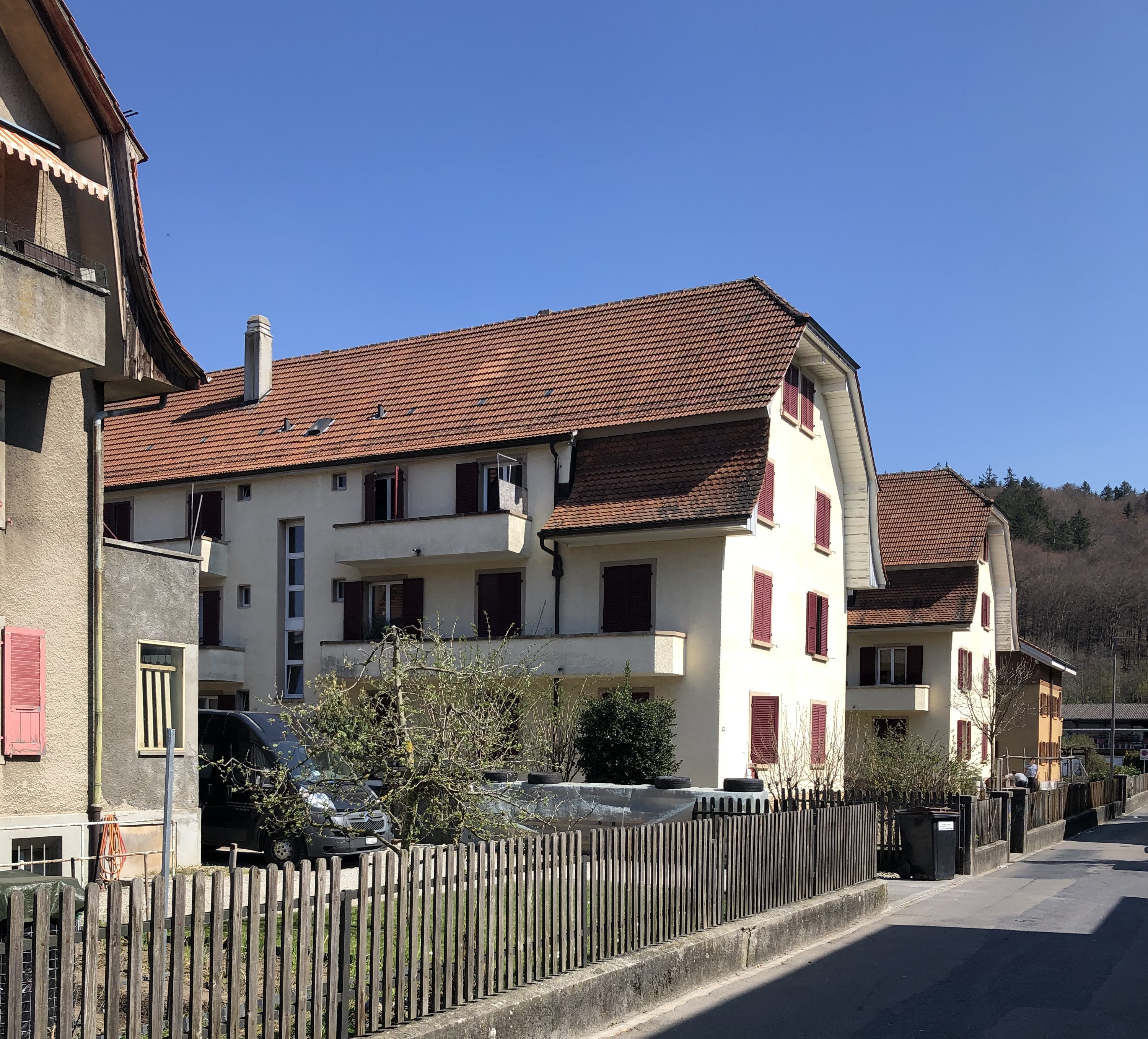 Weidmatt Bebauung